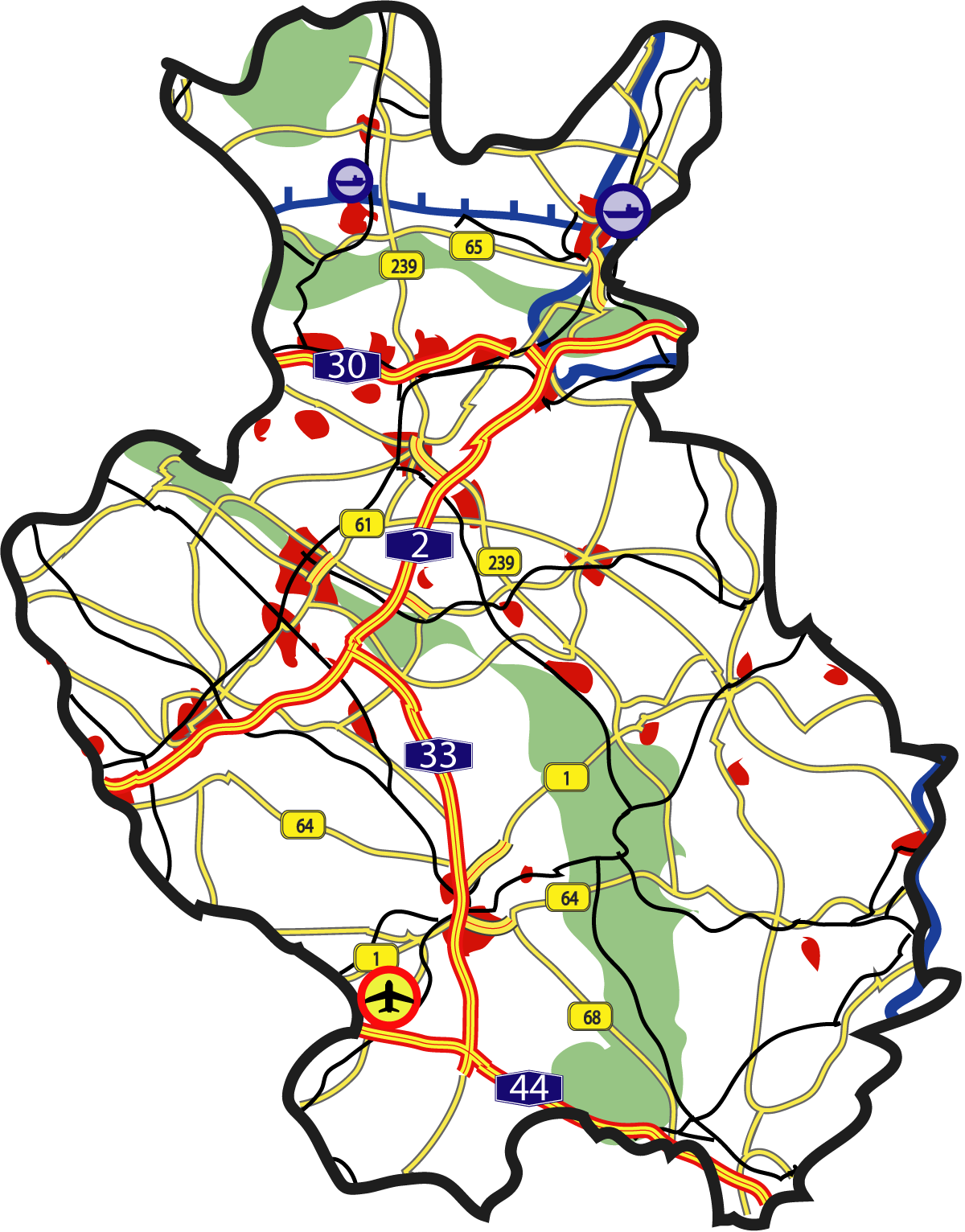 Streets, railways, waterways, ports and airports in Ostwestfalen-Lippe